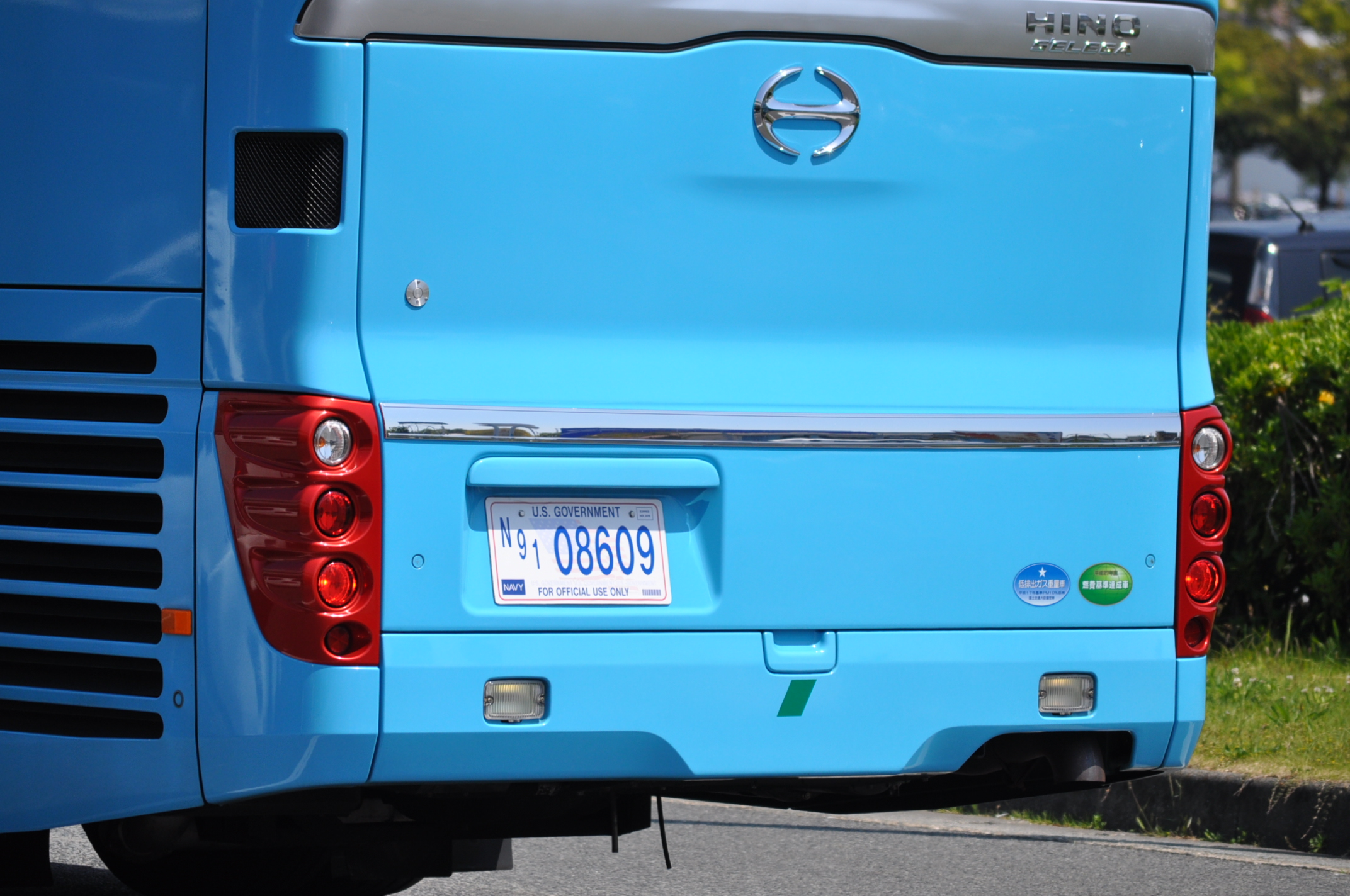 米軍用の空港・佐世保基地間連絡バスに装着されているナンバープレート。福岡空港にて撮影。